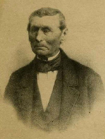 Eugenius Maeyens (1787-1867) - burgemeester Knesselare (1848-1859) - Oost-Vlaanderen - België